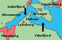 Flensborg Fjord